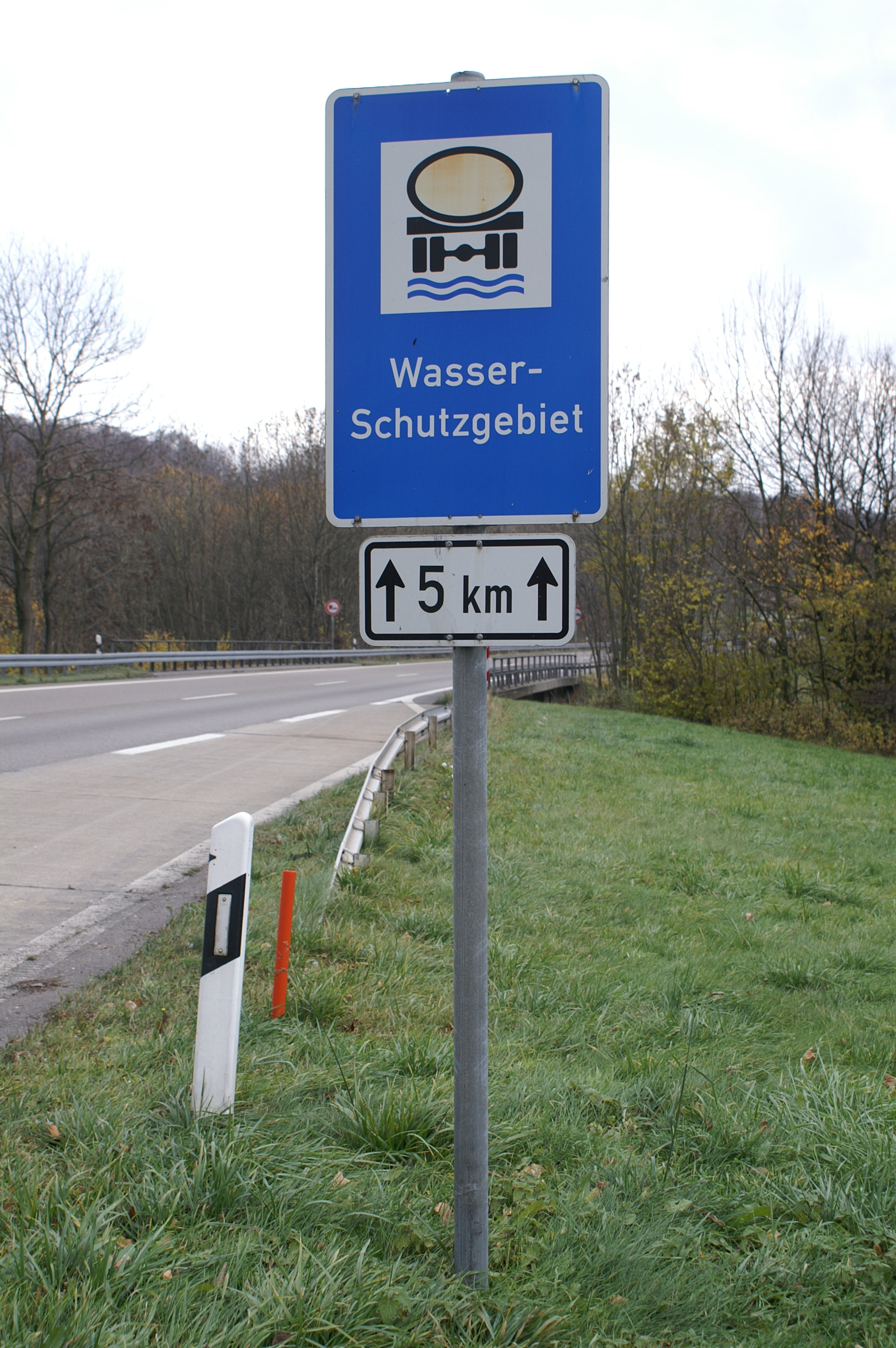 In Wasserschutzgebieten ist besondere Vorsicht beim Transport von wassergefährdenden Stoffen geboten